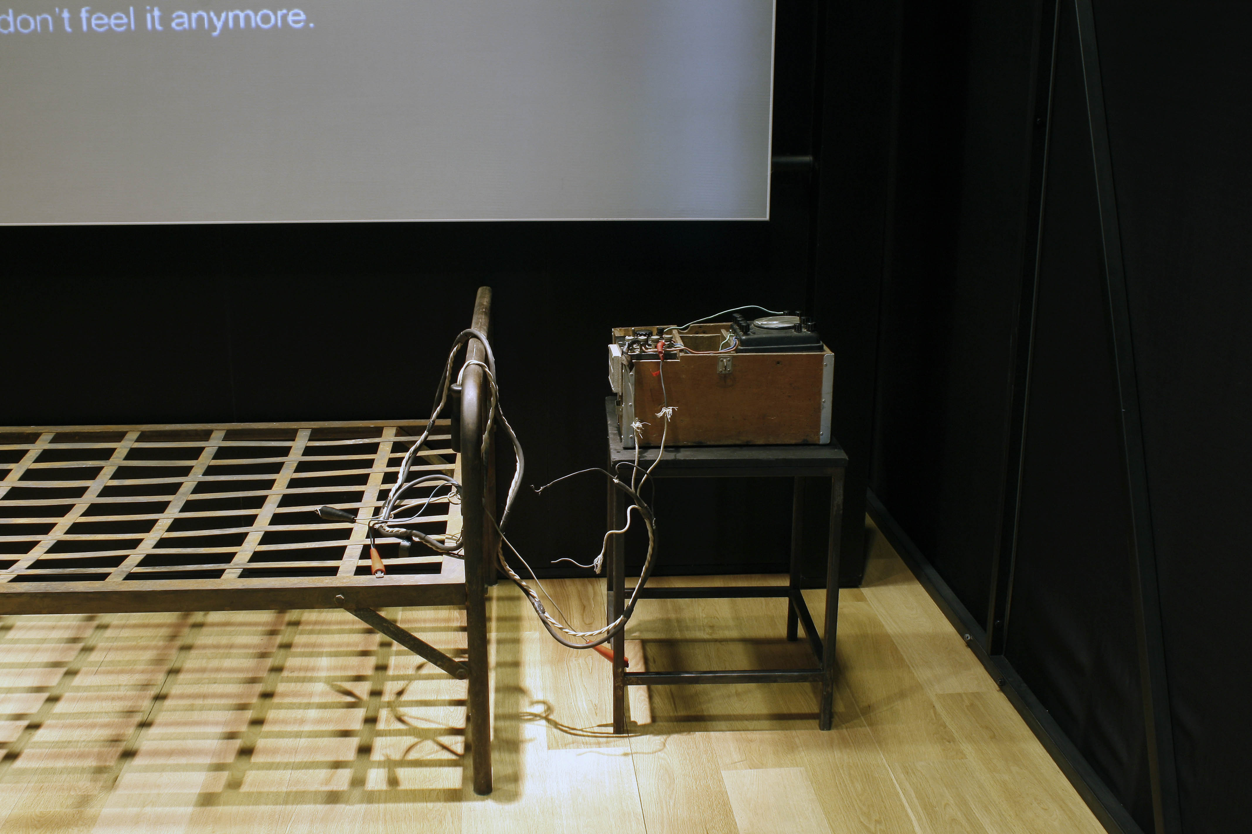 Fotografía de la sala 11 de septiembre del Museo de la Memoria de Santiago de Chile que muestra aspectos de las torturas y represión cometidos por organismos del Régimen militar chileno entre 1973 y 1989